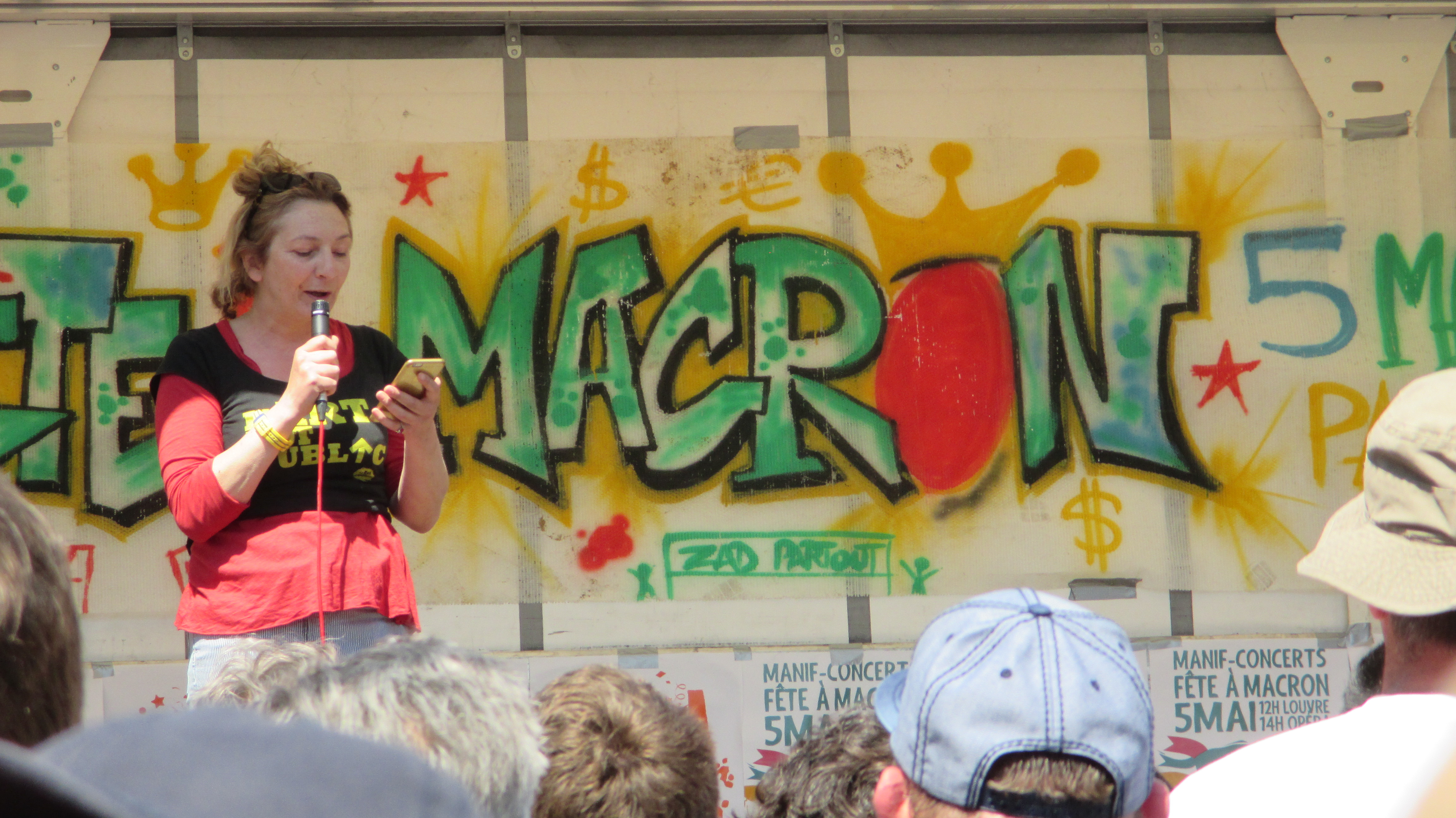 Manifestation du 5 mai 2018 La fête à Macron, place de l'Opéra. Corinne Masiero prend la parole place de l'Opéra.